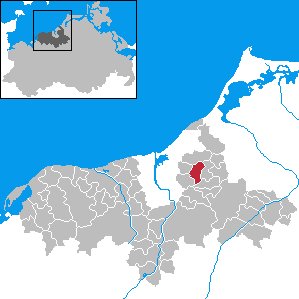 Klein Kussewitz in Mecklenburg-Western Pomerania - District Bad Doberan